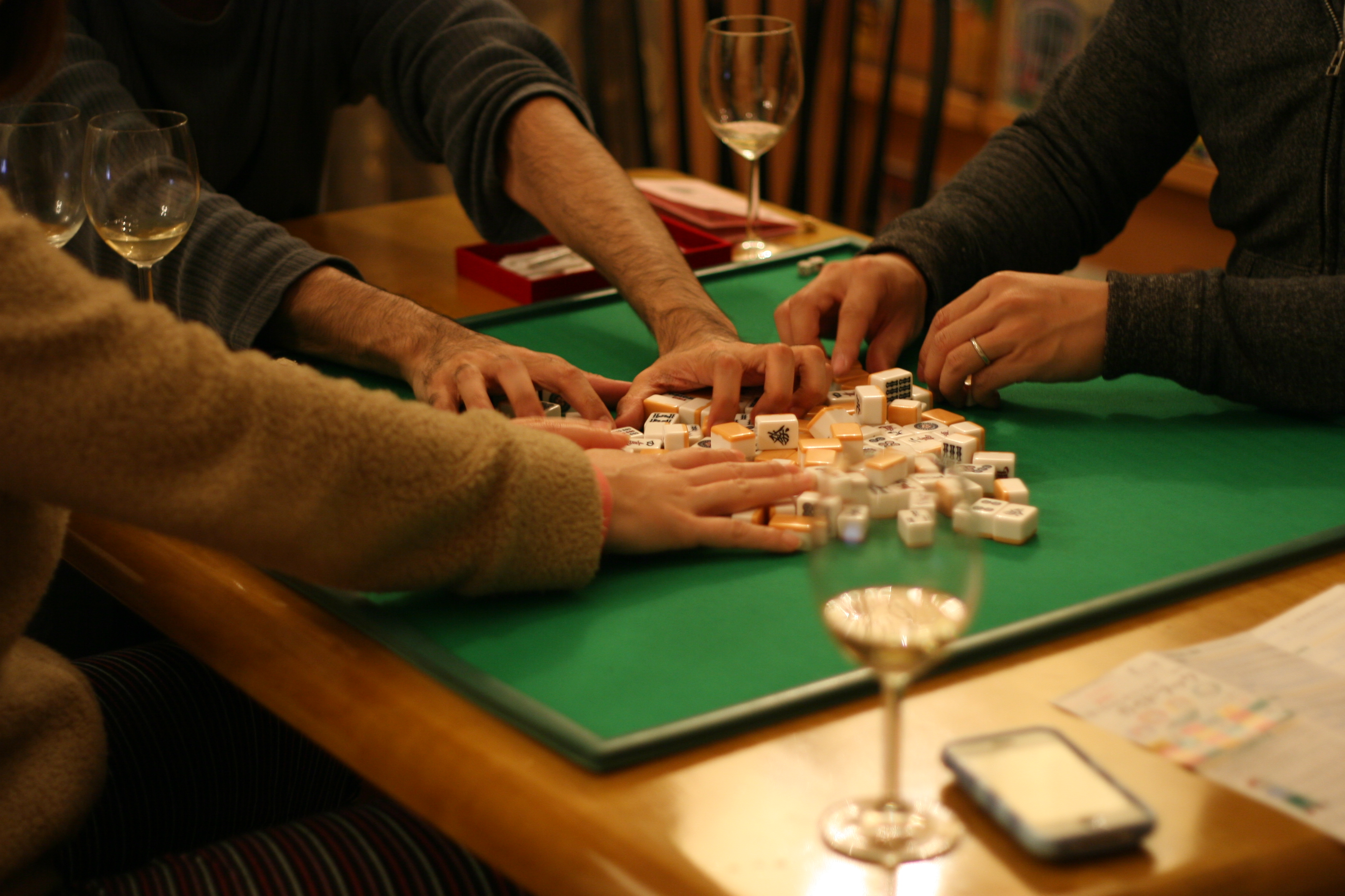 年越しマージャン？